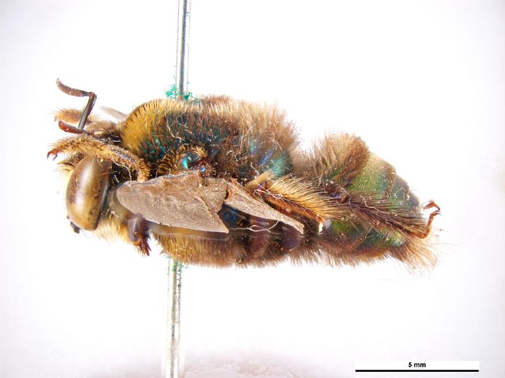 Xylocopa bombylans male